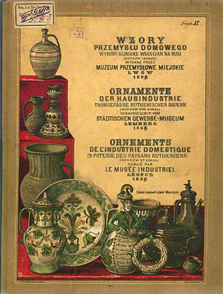 Обложка каталога Промышленного музея во Львове, «Образцы домашнего промысла. Глиняные изделия крестьян на Руси»